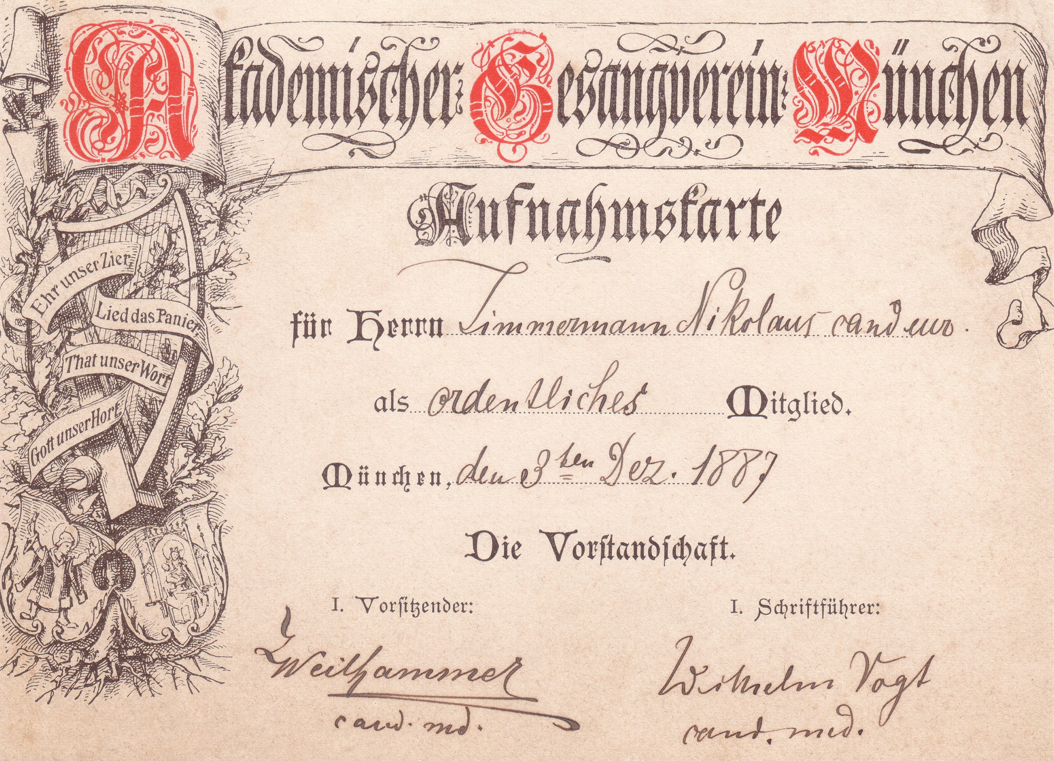 „Aufnahmskarte“ des Akademischen Gesangvereins München vom 3. Dezember 1887.